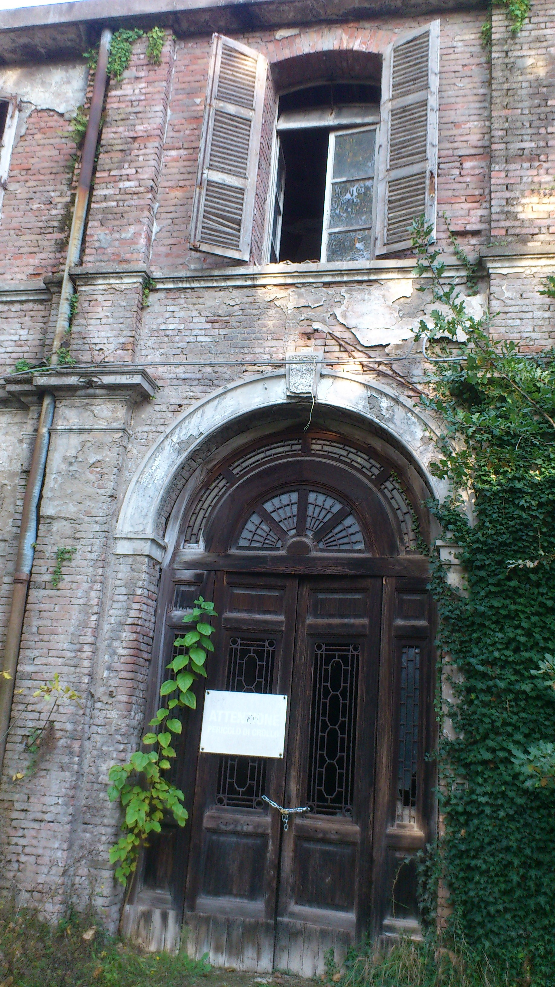 Entrata del padiglione uomini con porta originale del 1907.